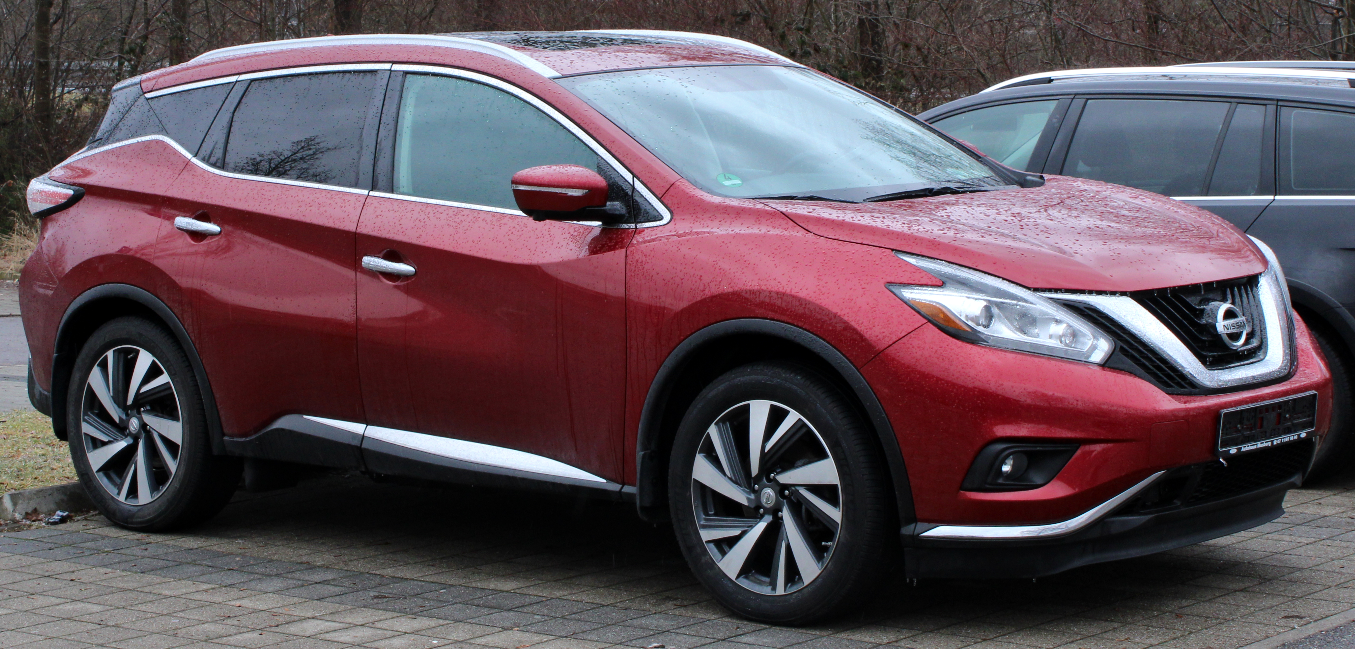 Nissan Murano Platinum in Stuttgart-Vaihingen